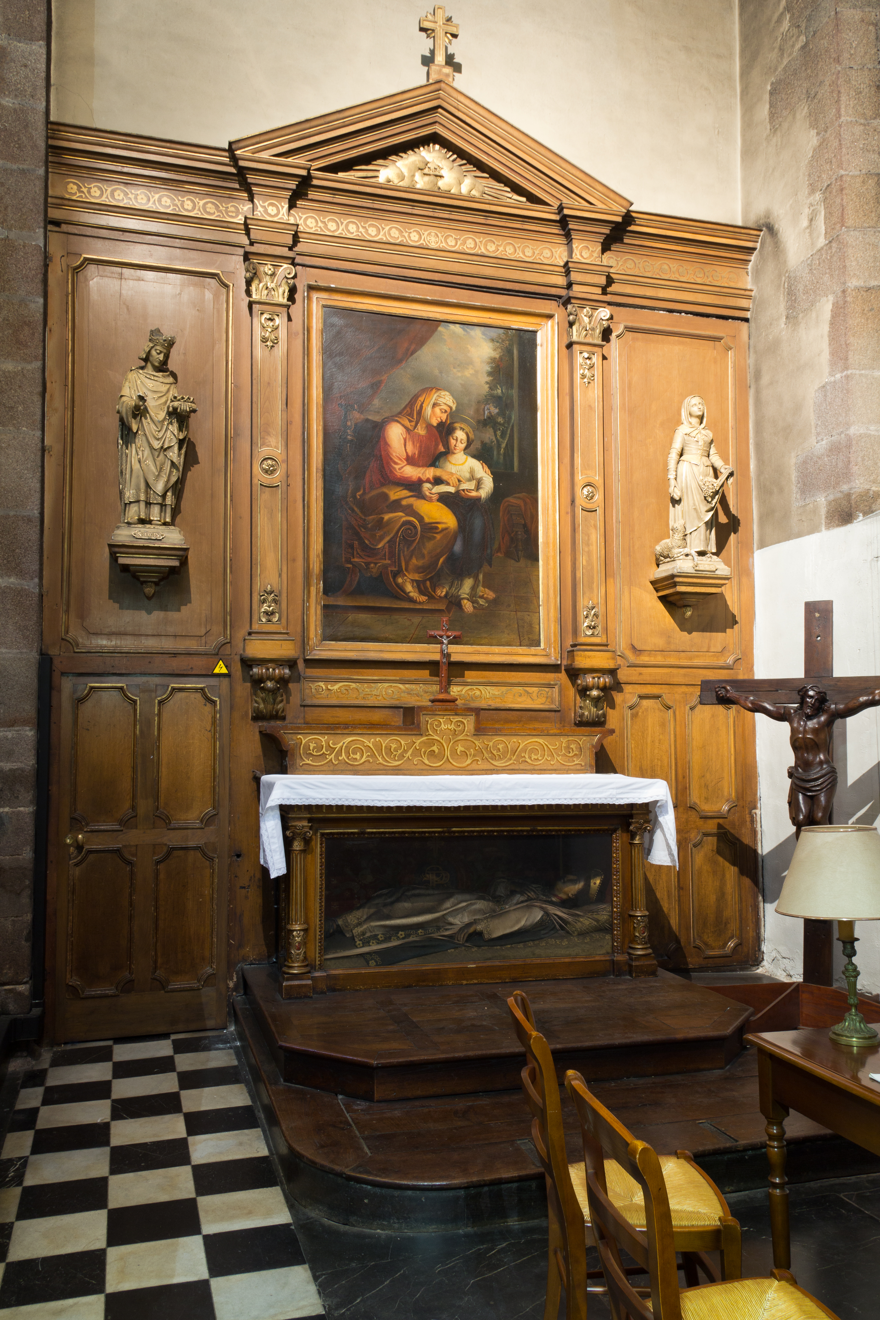 Tableau de Toussaint Jourjon (1843). Statues de Charles Goupil (1871) : à gauche, saint Louis, à droite, sainte Germaine Cousin. Retable agrandi par Mélin (1871).